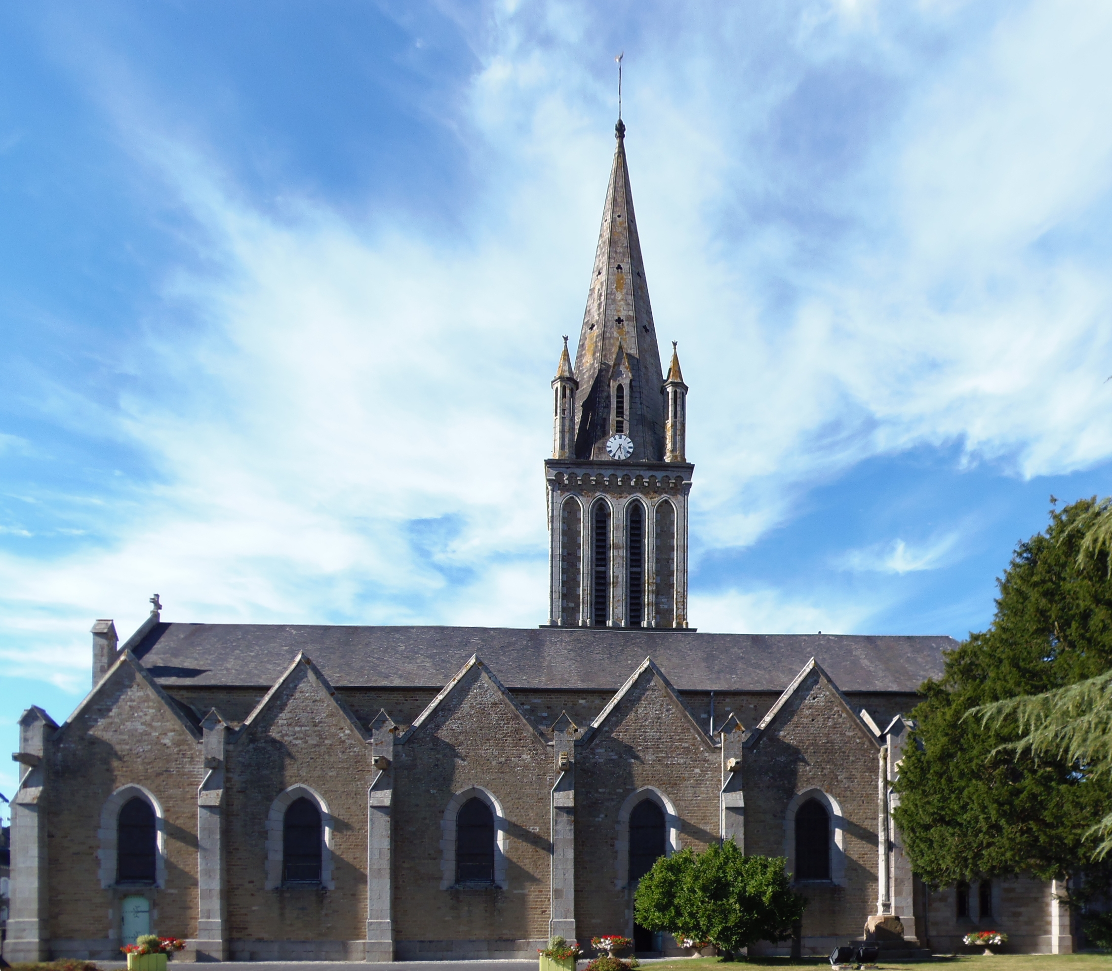 Tessy-sur-Vire (Normandie, France). L'église Saint-Pierre.